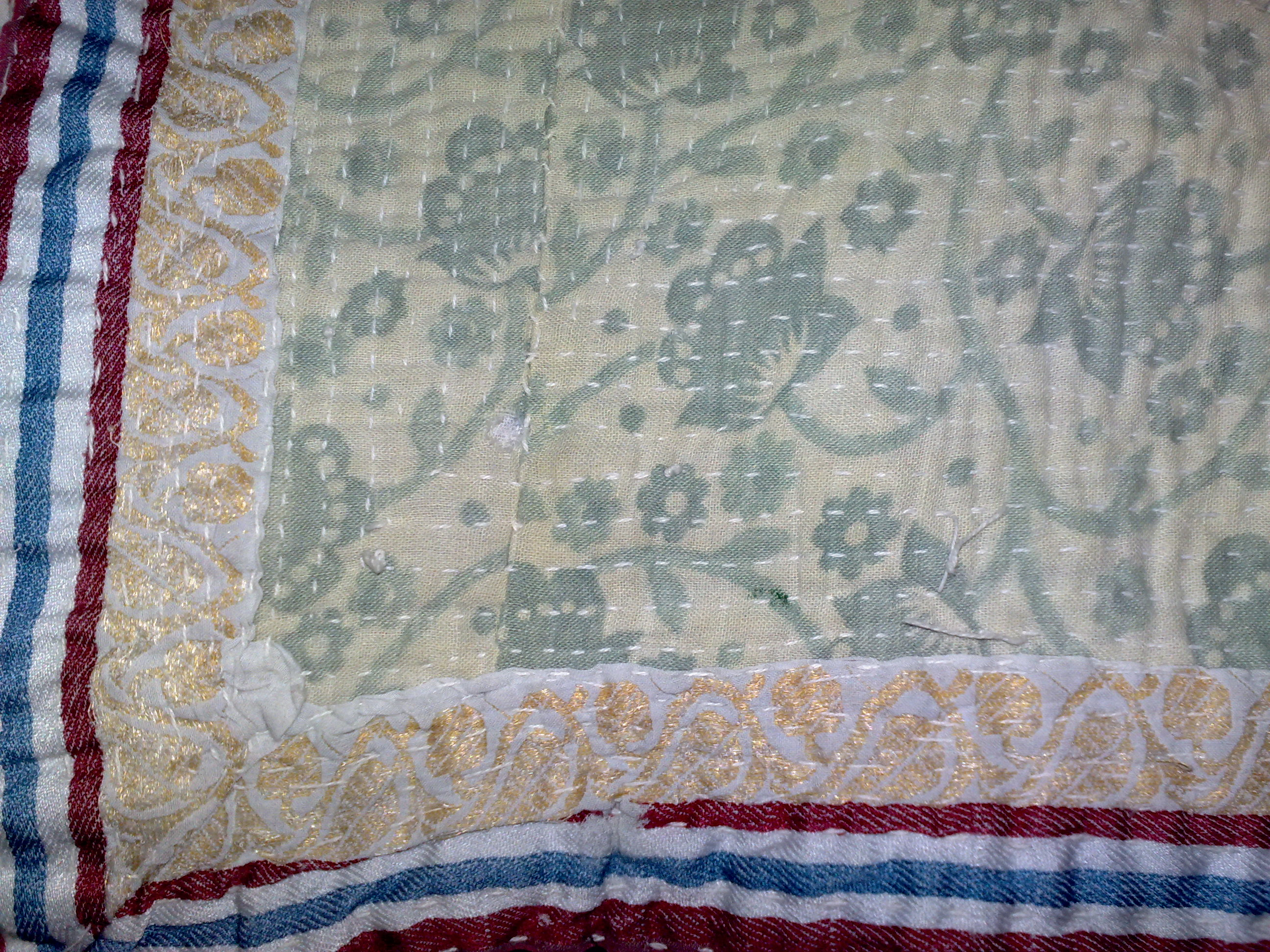 কাছে থেকে দেখা কাঁথা